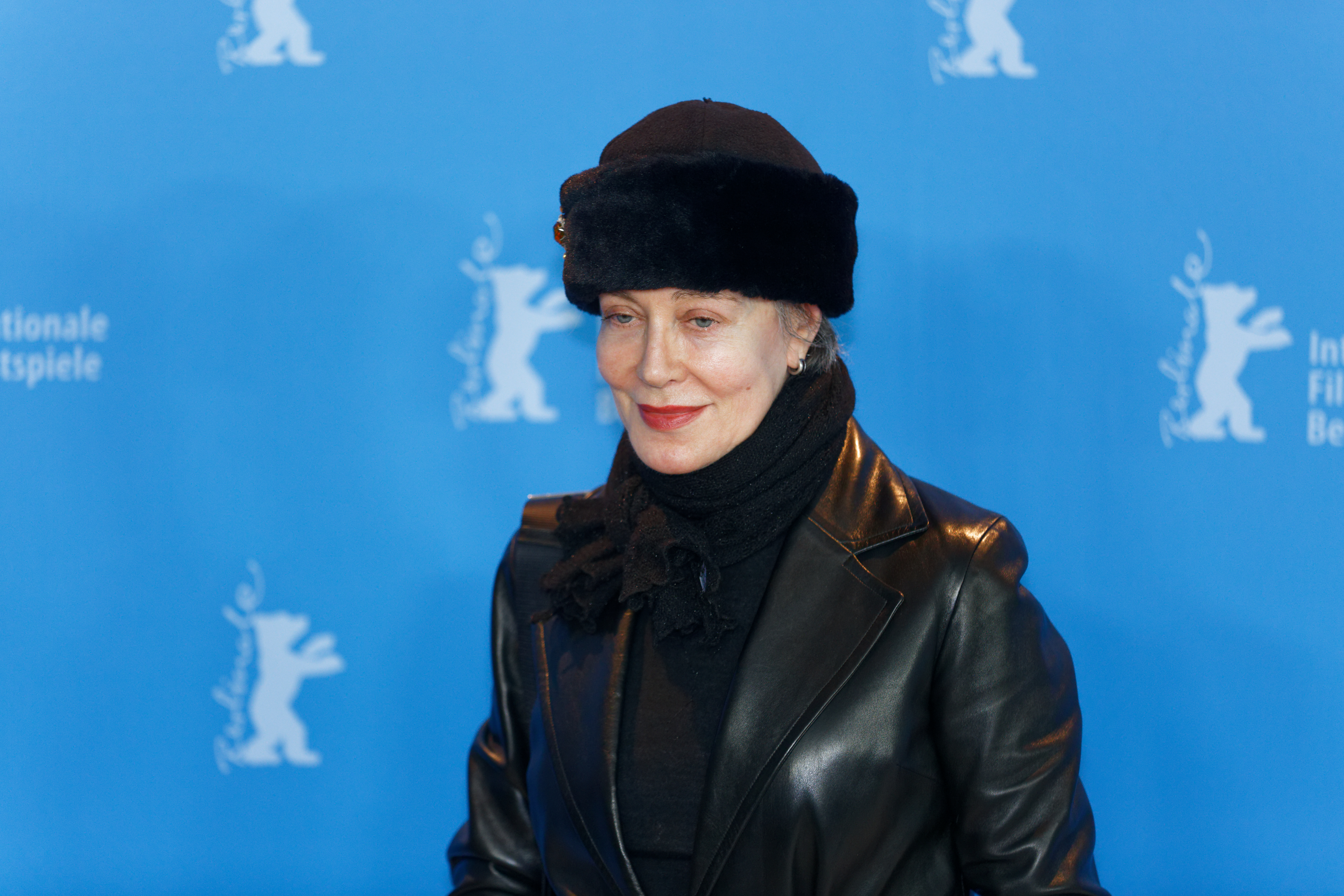 Milena Canonero bei der Berlinale 2017